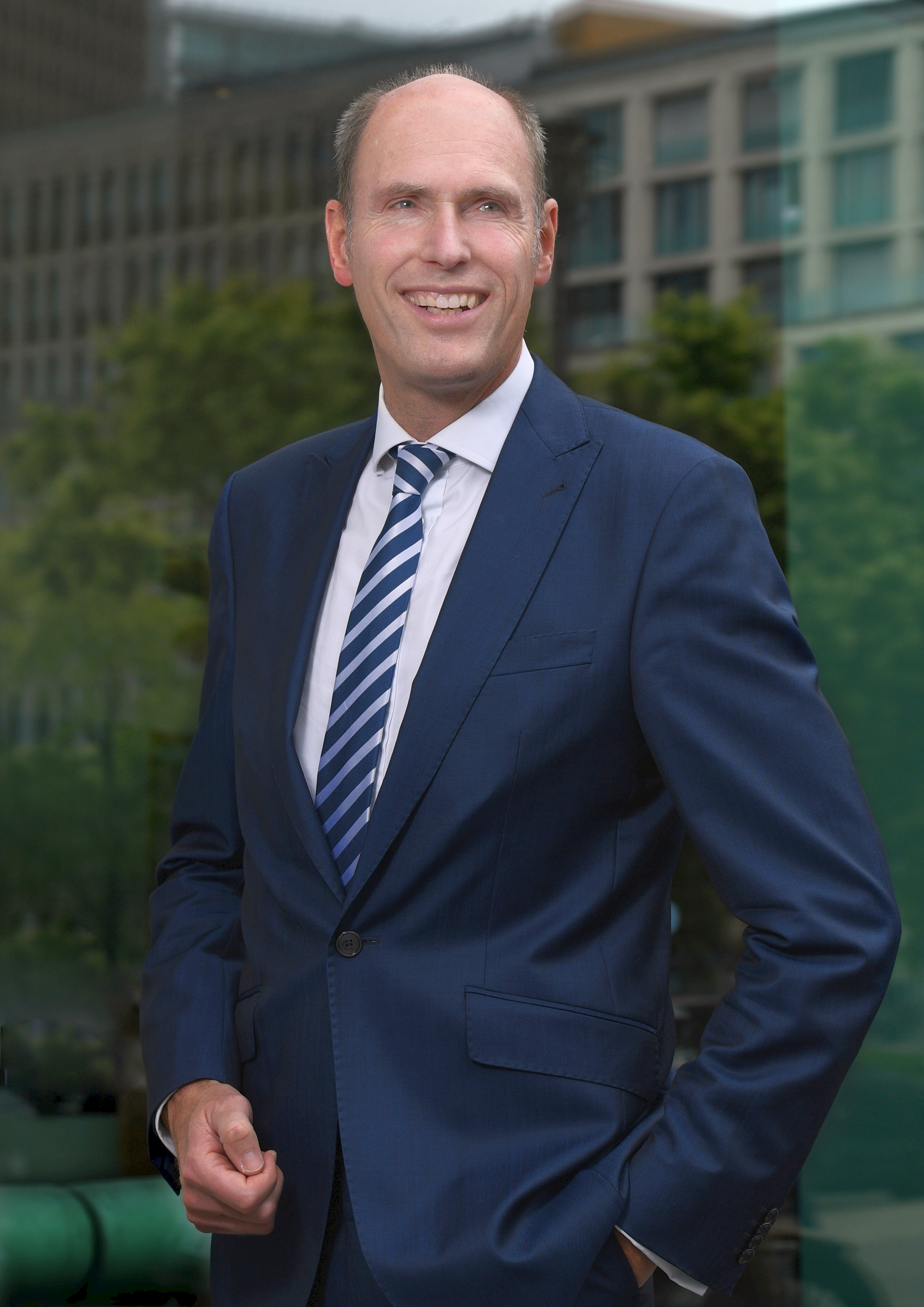 Portraitfoto von Prof. Dr. Peter-André Alt, Präsident der Hochschulrektorenkonferenz